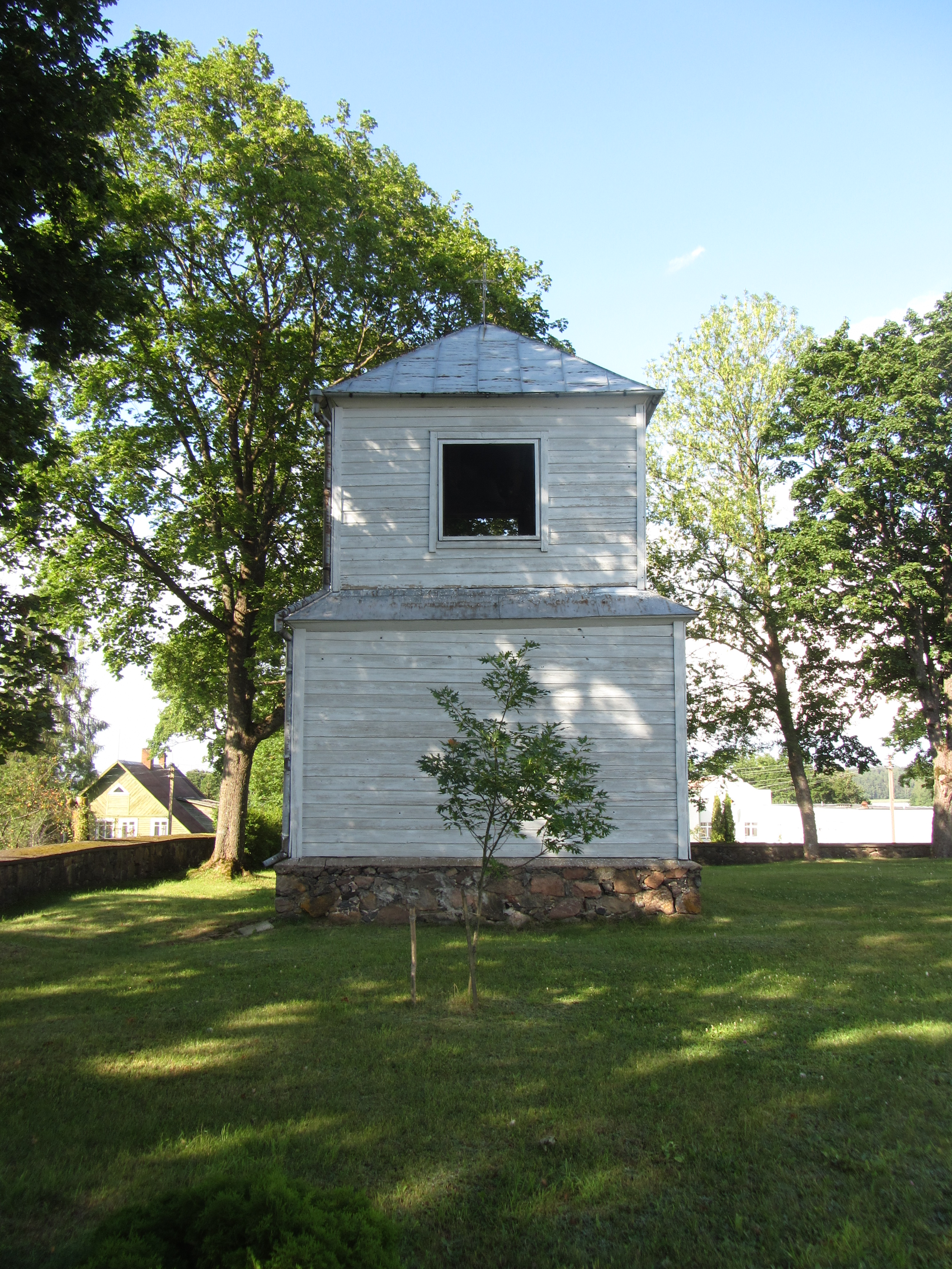 Sudeikiai, Lithuania